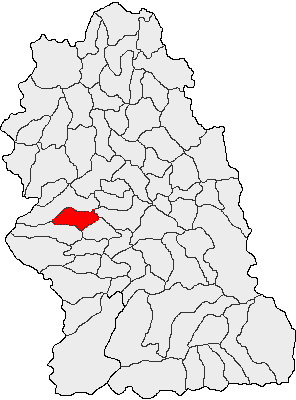 Categorie:Hărţi ale judeţului Hunedoara